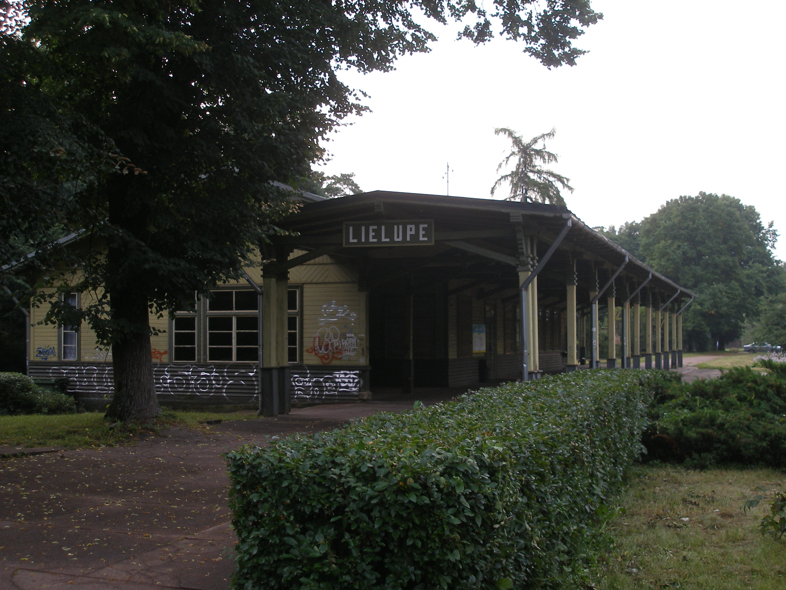 Lielupes stacijas ēka.